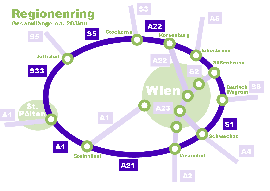 Regionenring um Wien, Endausbau voraussichtlich nach 2018